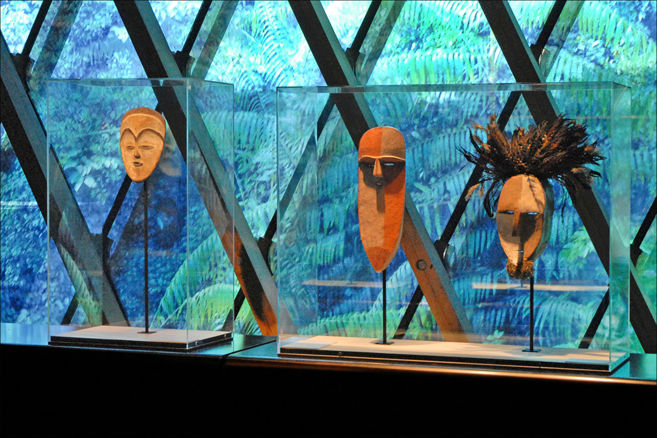 L'exposition : "Fleuve Congo" au musée du Quai Branly à Paris du 22/06/2010 au 03/10/2010 Le musée du quai Branly présente cet été, à travers 170 œuvres majeures et 80 documents, une importante exposition consacrée aux traditions artistiques d’Afrique Centrale, à savoir le Gabon, la République populaire du Congo et la République démocratique du Congo. Cette exposition, d'approche avant tout esthétique, explique peu les pratiques religieuses et sociales des peuples d'Afrique centrale. L'exposition met en lumière l'influence que l'art d'Afrique centrale a eu au début du 20ème siècle sur les artistes (Apollinaire, Derain, Lapicque, Picasso,..).